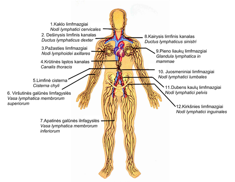 Limfines sistemos morfologija